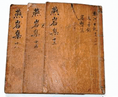 朴趾源作、燕岩集